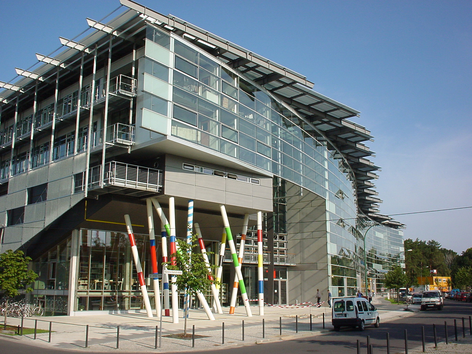 Gebäude der Filmuniversität